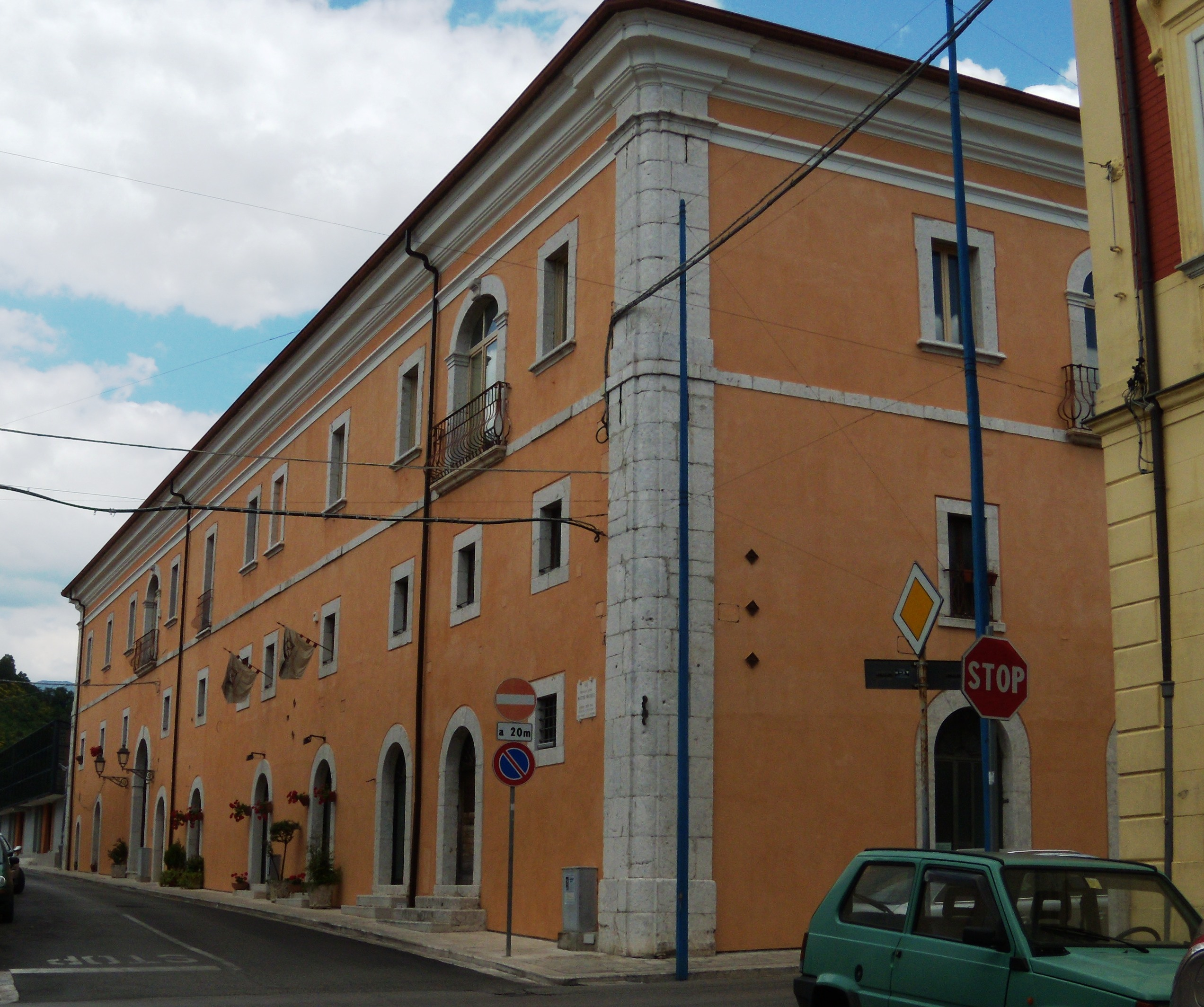 Esterno di Palazzo Sant'Antonio in Cerreto Sannita (Benevento).